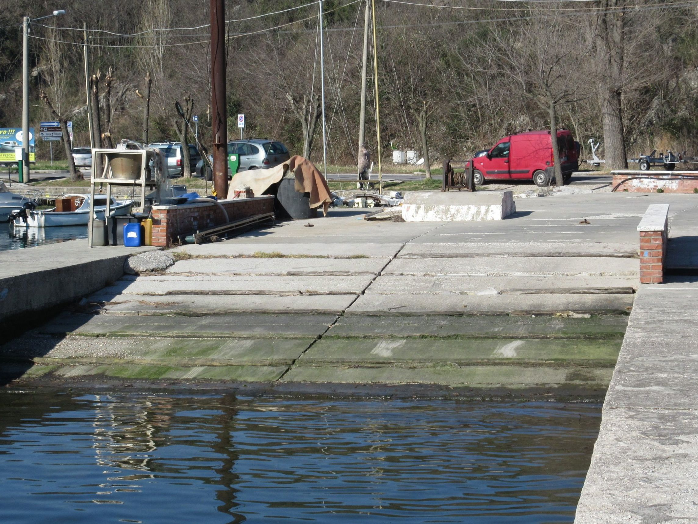 Foto propria del 11.2.2015 Lo squero del Villaggio del Pescatore - Duino-Aurisina (Trieste)